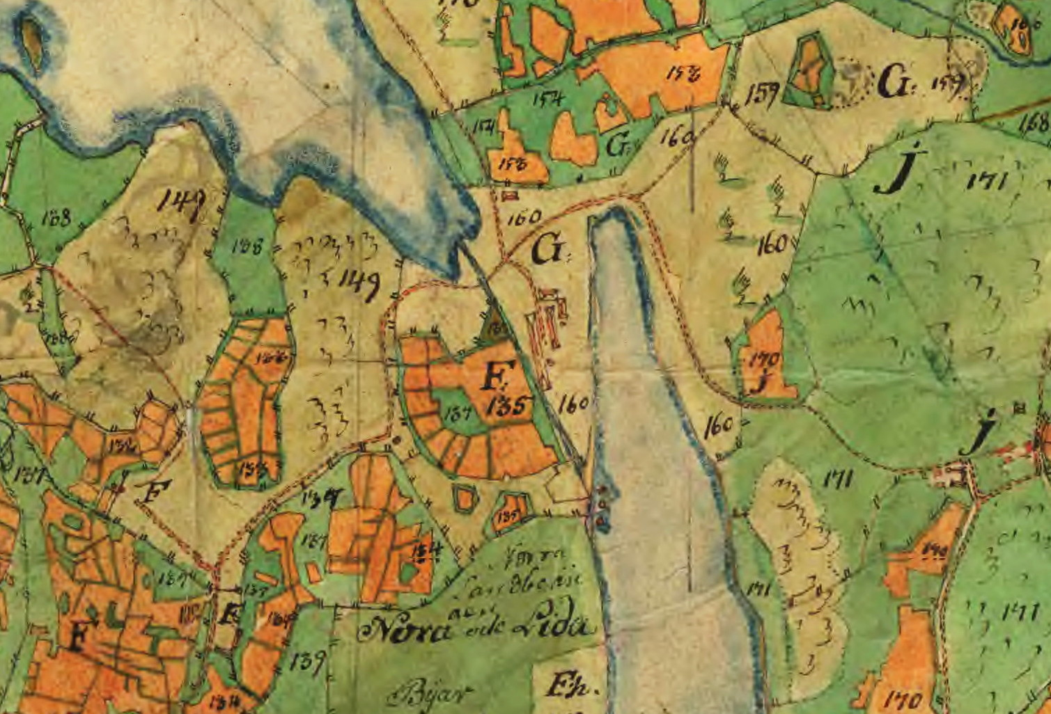 Del av karta över Muskö visande Muskö kanal